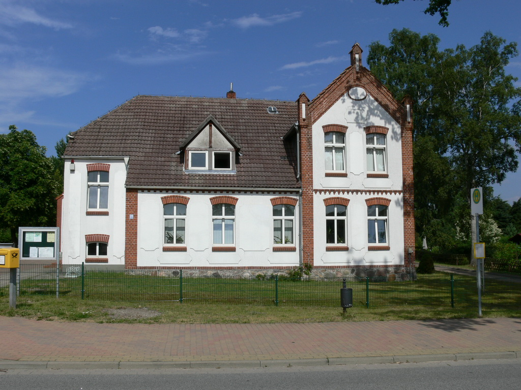 Verwaltungsgebäude vom Amt Rostocker Heide